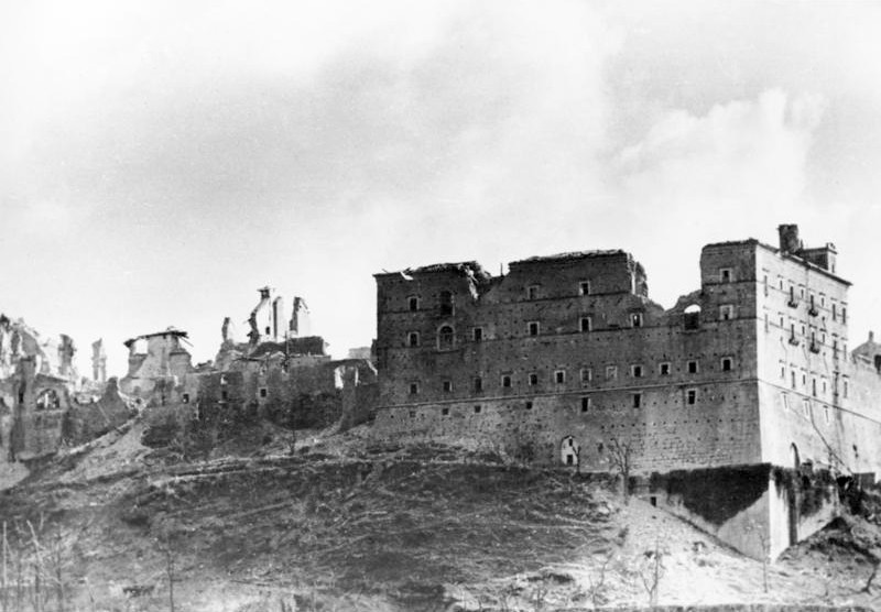 Monte Cassino-ein Trümmerfeld 83 anglo-amerikanische Bomber haben am 15. Februar ihre Bombenlast über dem ehrwürdigen Kloster von Monte Cassino, der Geburtsstätte des Benediktinerordens abgeworfen. Das herrliche Bauwerk wurde vollständig zerstört und unersetzliche Kulturwerte vernichtet. Als Vorwand der Bombardierung diente die Behauptung, deutsche Truppen hätten das Kloster als Artilleriefestung ausgebaut, eine Behauptung, die inzwischen durch Erklärungen der Mönche von Monte Cassino restlos entkräftet wurde. PK-L 2242